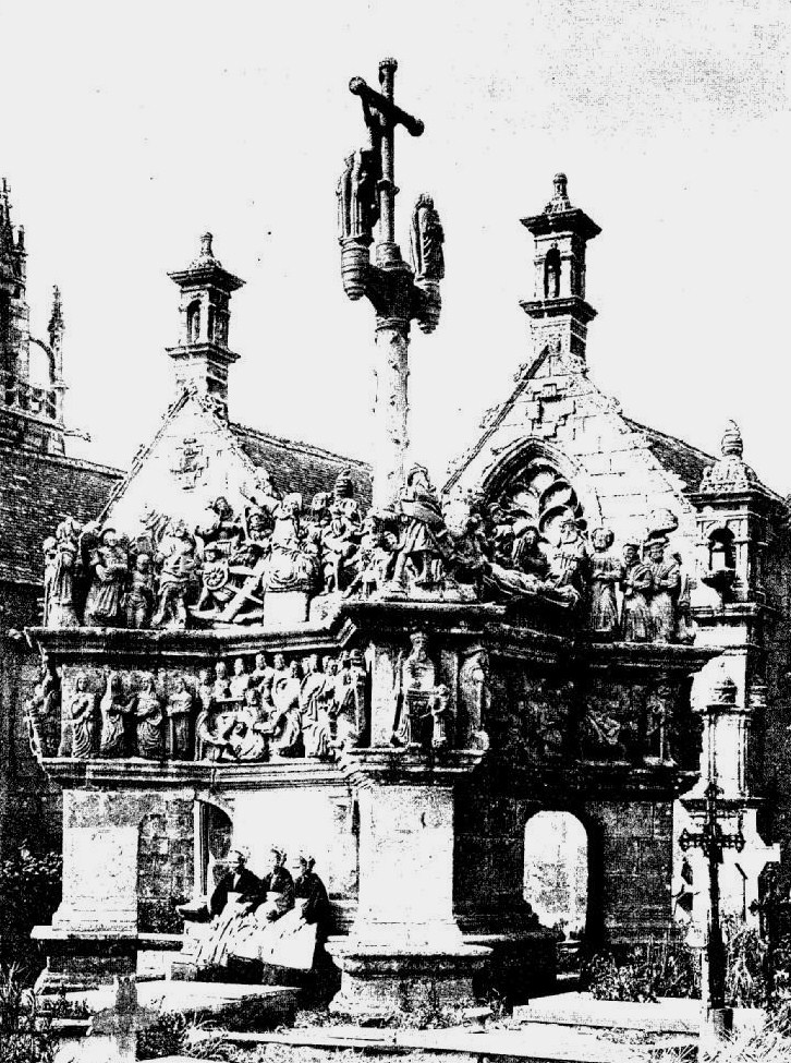 Le calvaire de Guimiliau en 1902 (Le Tour du monde, 1902)